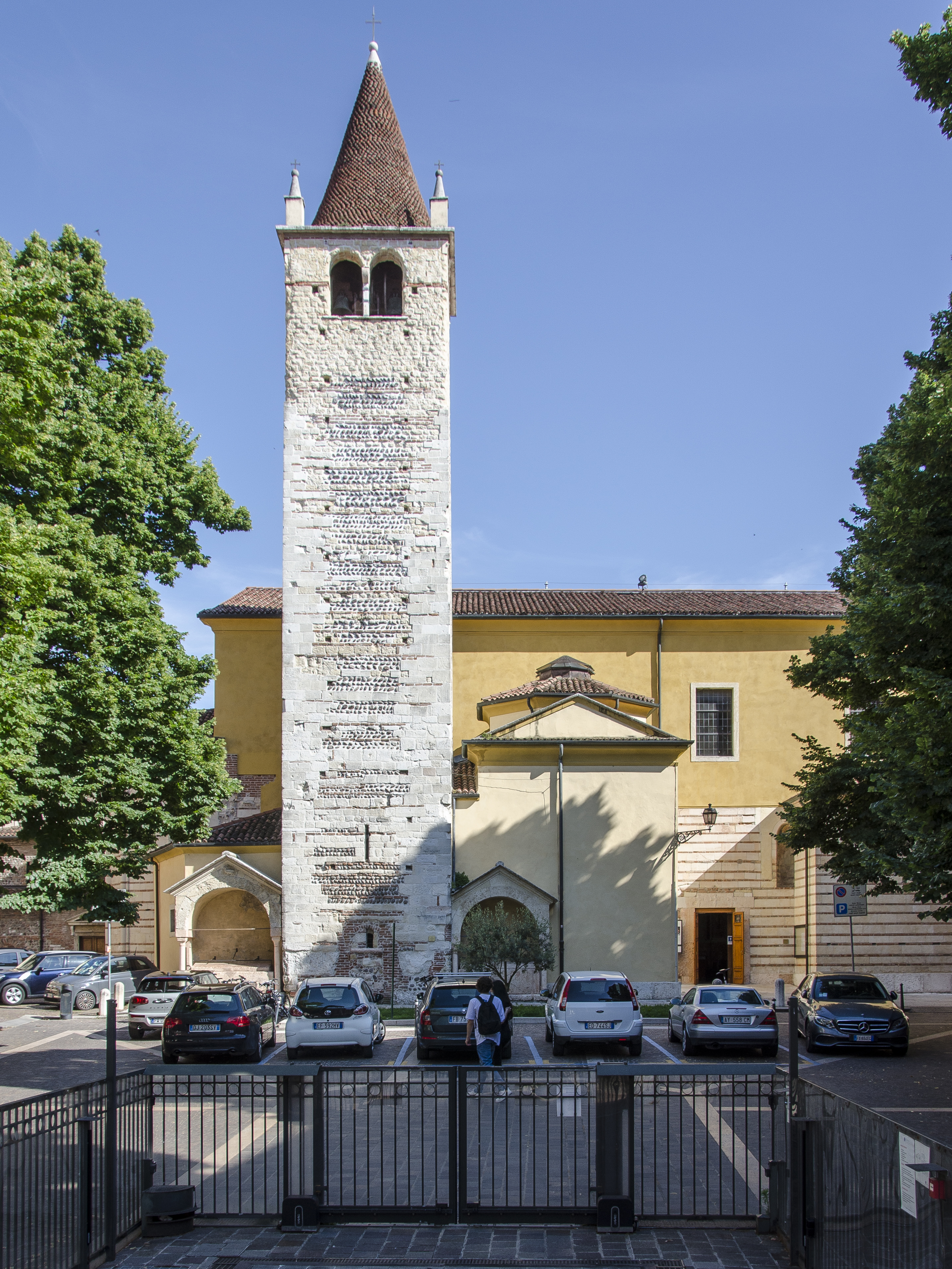 Chiesa dei Santi Apostoli a Verona, campanile